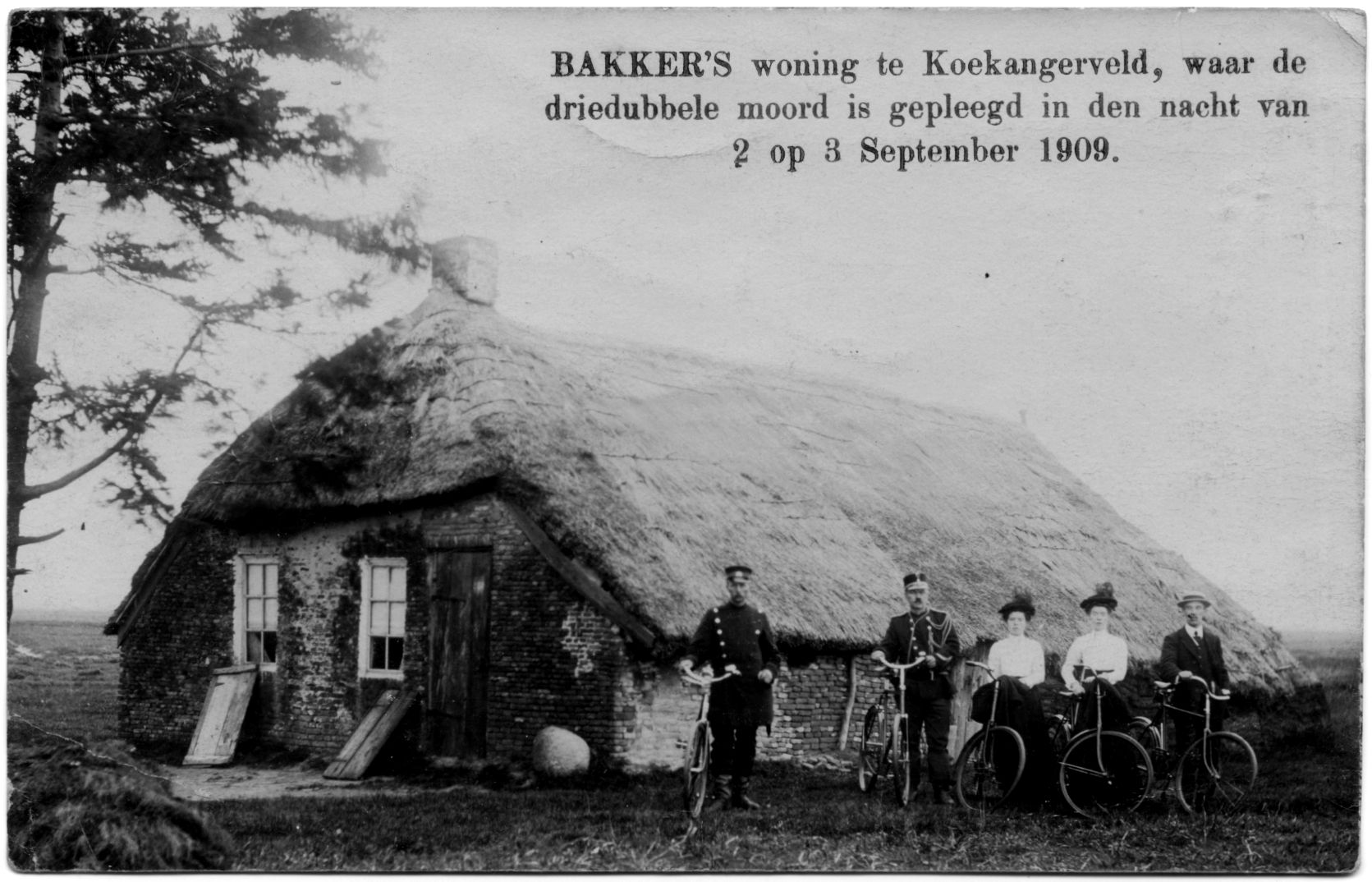 Bakker moord dames